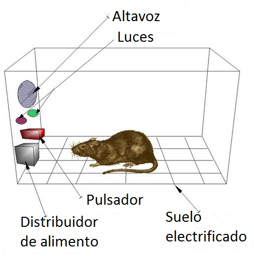 Ilustración de la instalación experimental utilizada por el psicólogo F.B. Skinner.